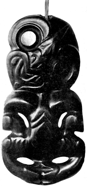 Hei-tiki neck pendant, size: 17cm, greenstone